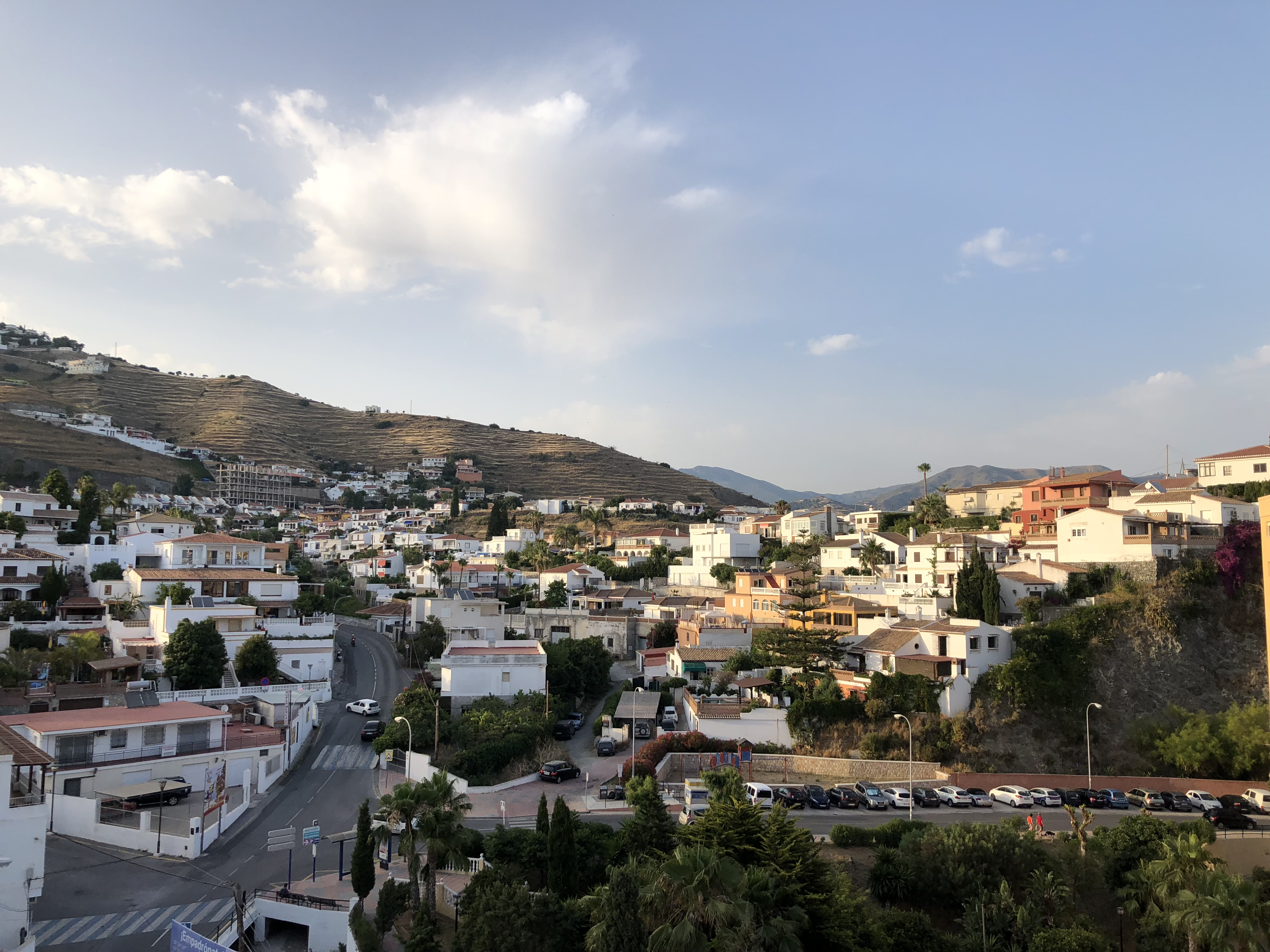 Almuñécar (Espagne) en juin 2018